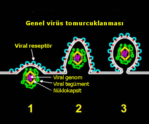 Tomurcuklanma yoluyla viral çıkış